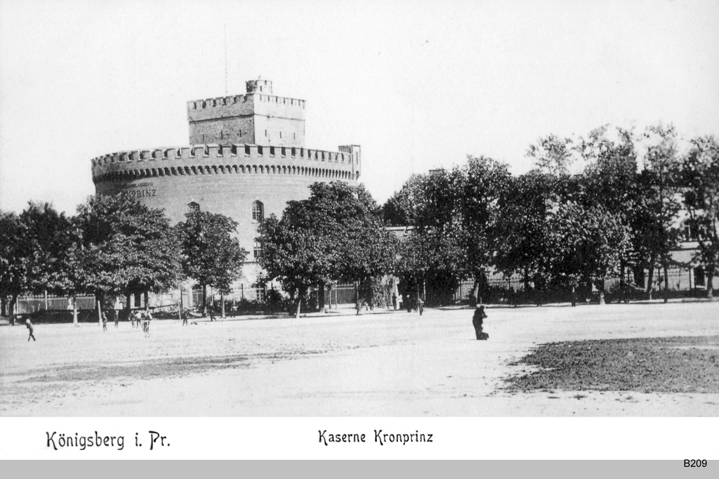 Kaserne Kronprinz in Königsberg, Ostpreußen